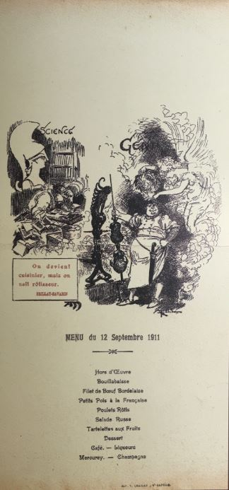 Menu